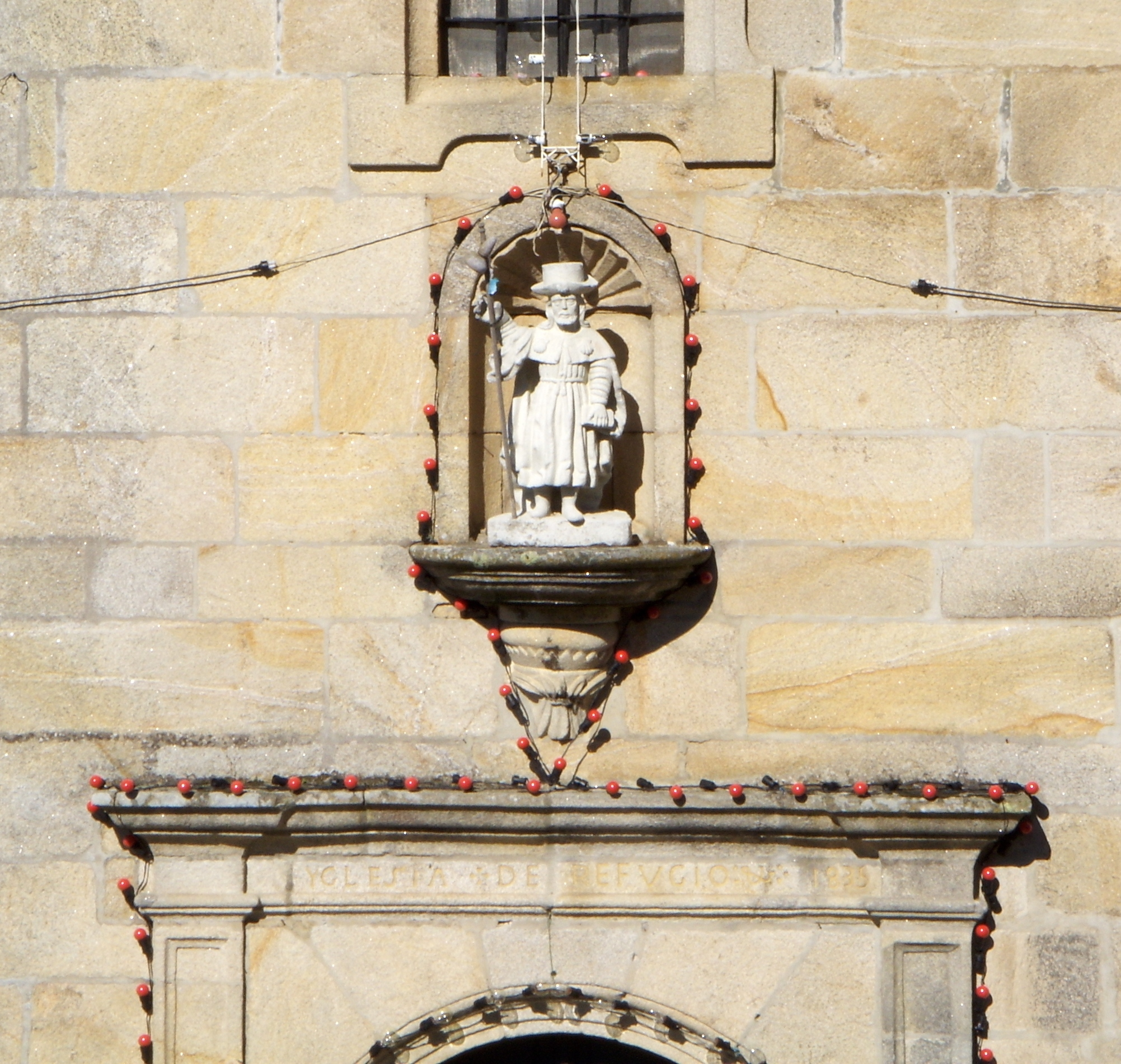 Igrexa parroquial de Santiago de Parada, Nigrán, detalle, "YGLESIA DE REFVGIO 1835"